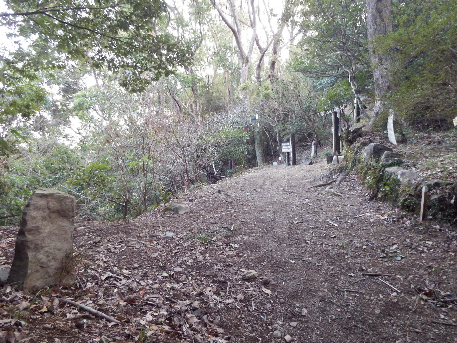 土佐遍路道青龍寺道の塚地峠